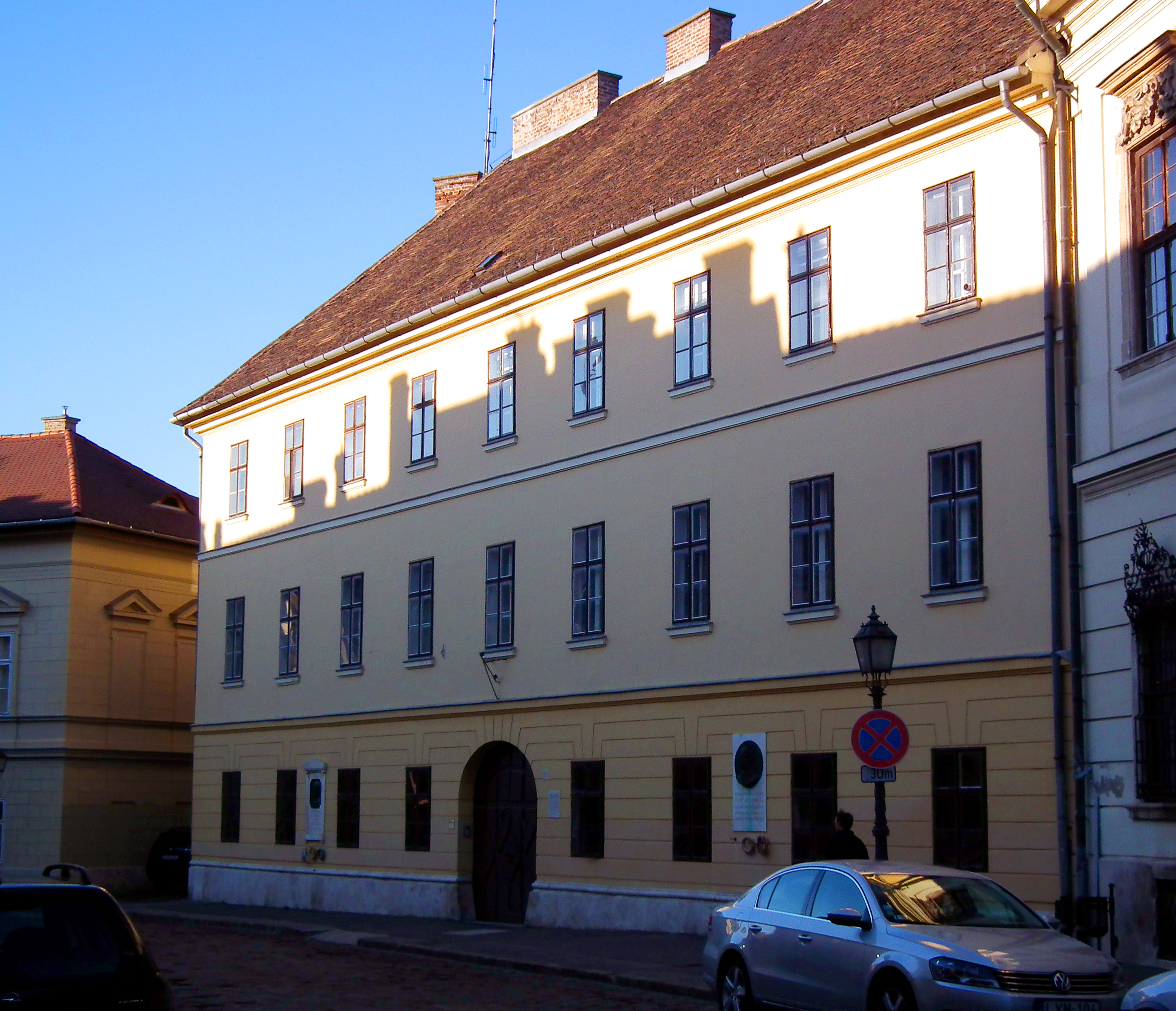 József-kaszárnya, az Erdélyi-bástya és Kammerhof This is a photo of a monument in Hungary. Identifier: 159